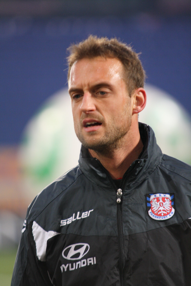 Björn Schlicke, FSV Frankfurt